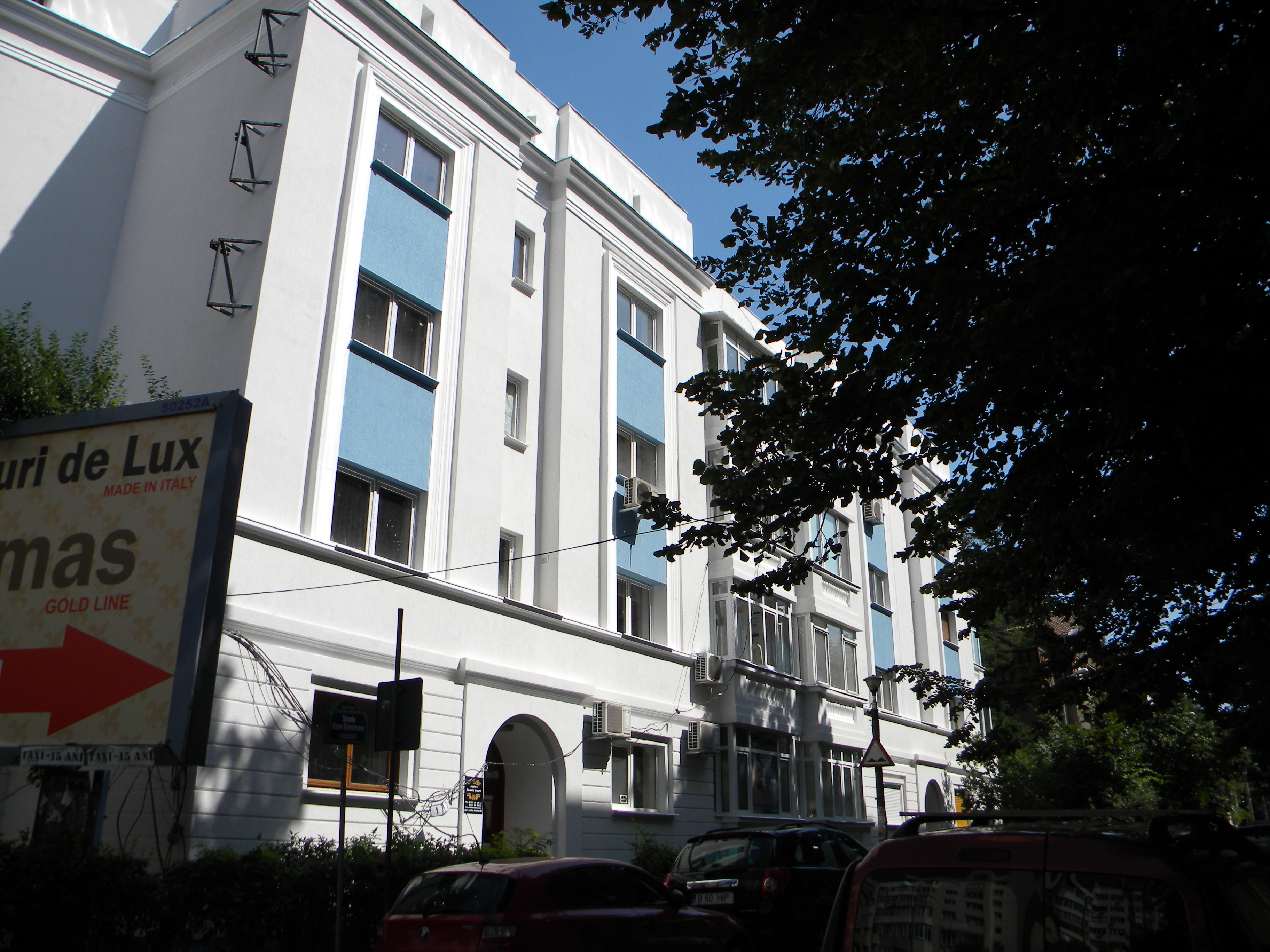 Bucuresti, Romania, Imobilul nr. 1-3 de pe Str Naum Ramniceanu; B-II-m-B-19520 si B-II-m-B-19522 (vedere de ansamblu)